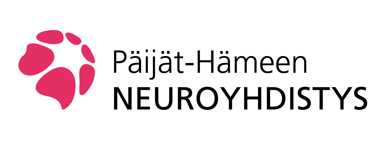 Päijät-Hämeen neuroyhdistys